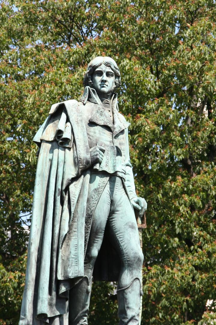 Statue de Lazare Hoche, sur la place Hoche à Versailles (Yvelines). Photo : PY. Stucki